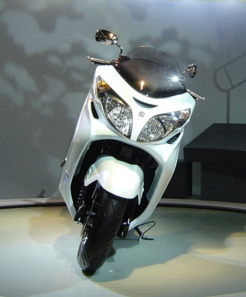 Suzuki SKYWAVE 250 typeS(2005 Tokyo Motor Show)